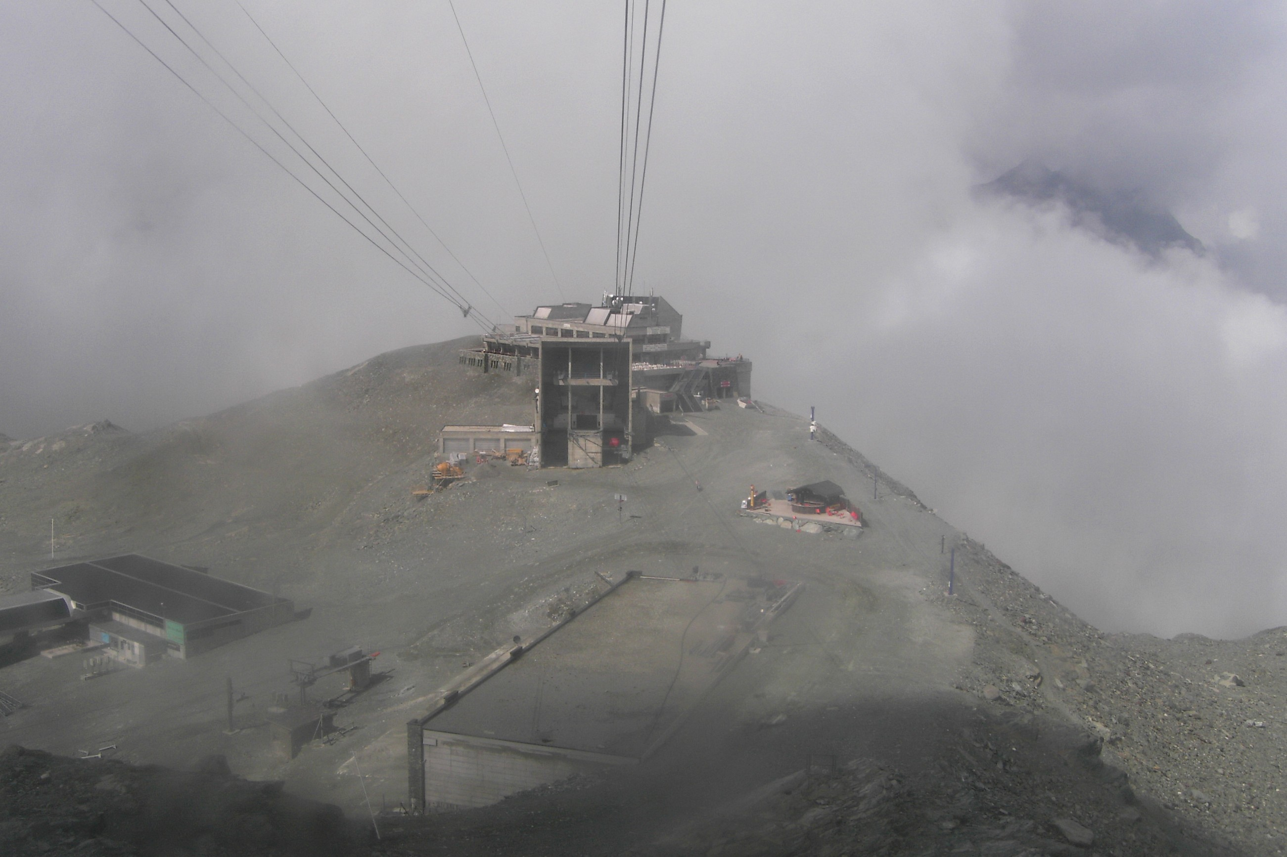 Seilbahnstation Trockener Steg von Seilbahn Richtung Klein Matterhorn fotografiert